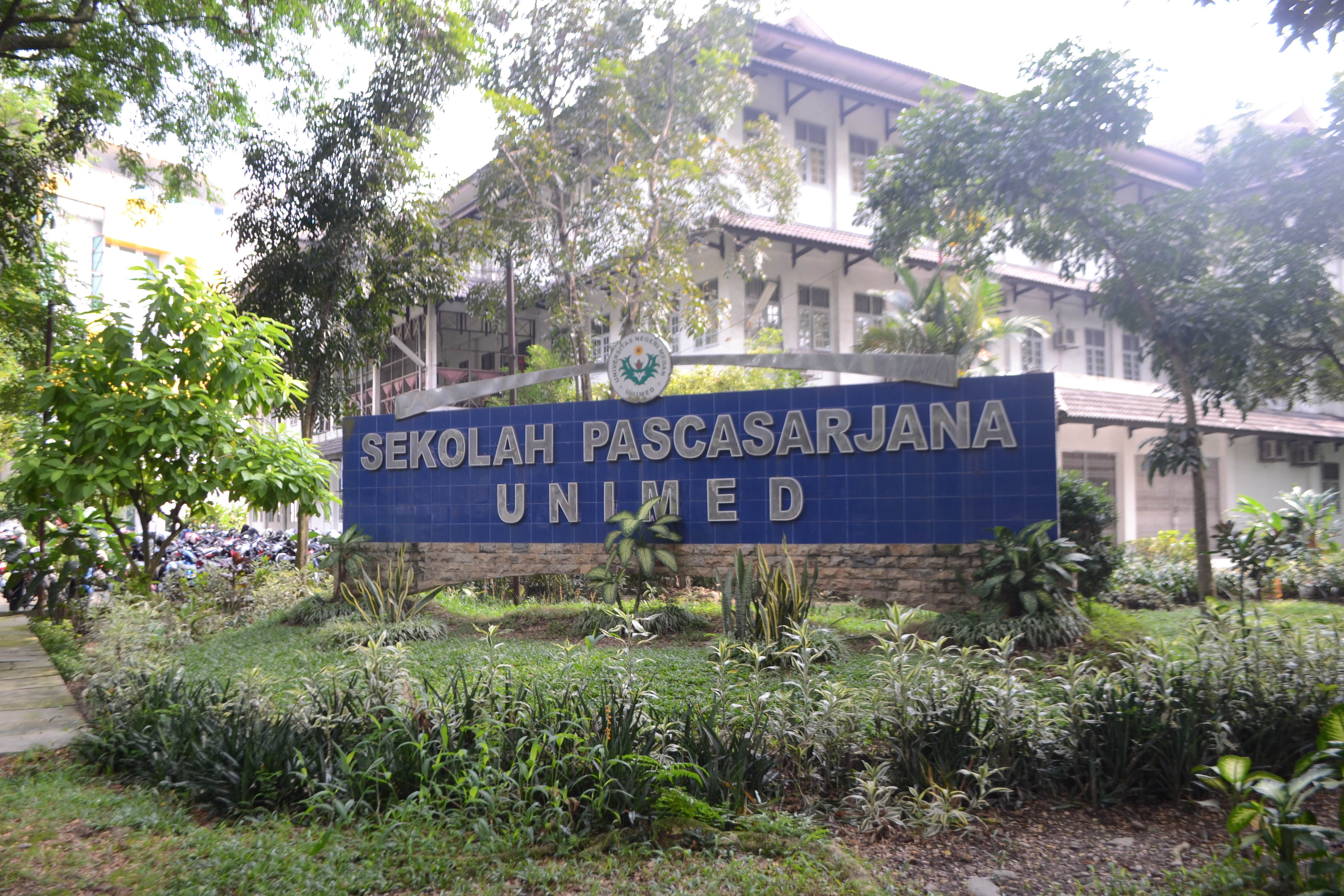 Gedung Pascasarana Universitas Negeri Medan